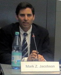 Prof. Dr. Mark Z. Jacobson